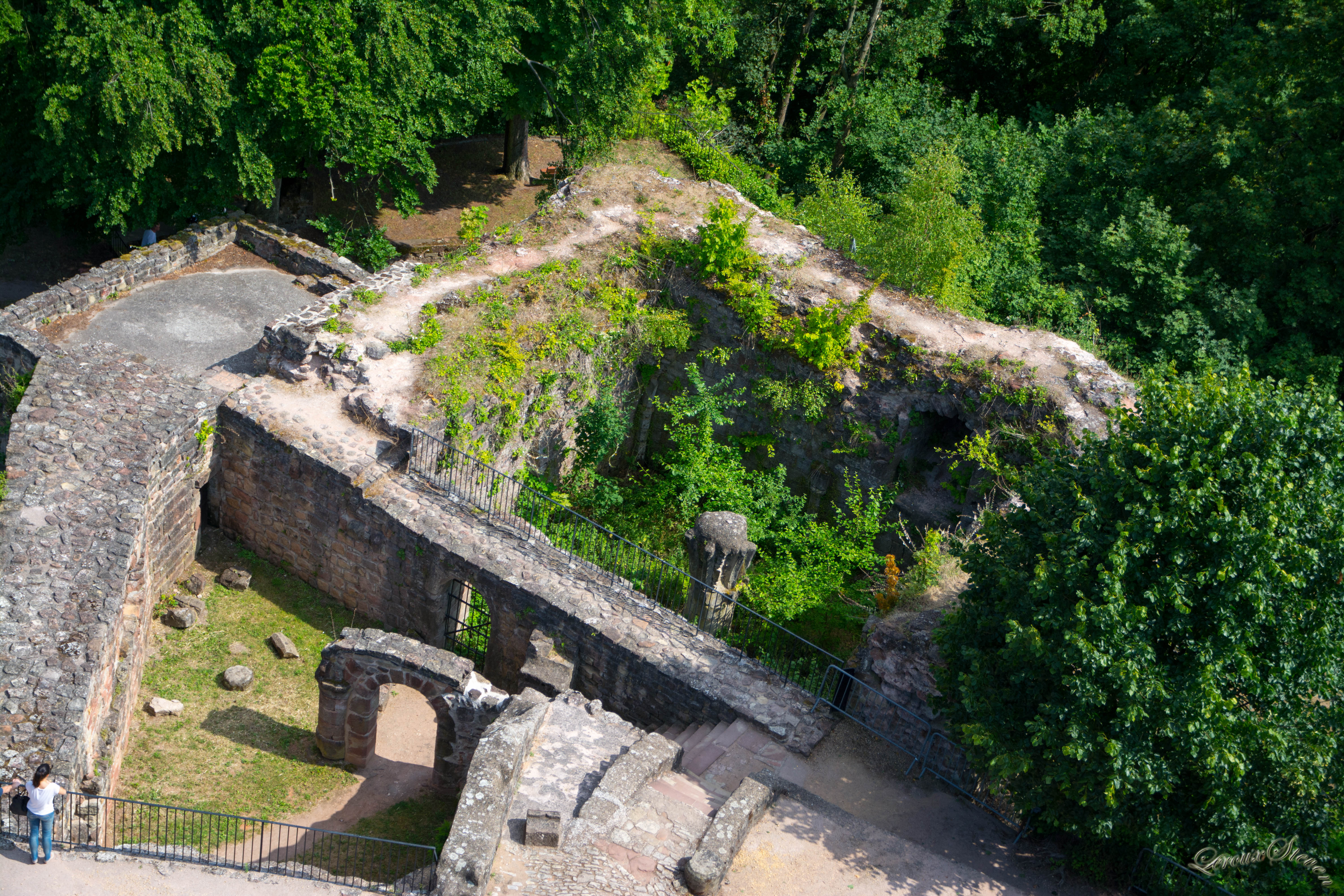 Chateau du schlossberg